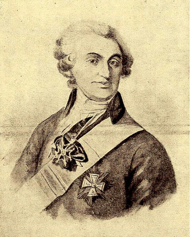 Беларуская (тарашкевіца): Партрэт Францішка Ельскага (Francišak Jelski)